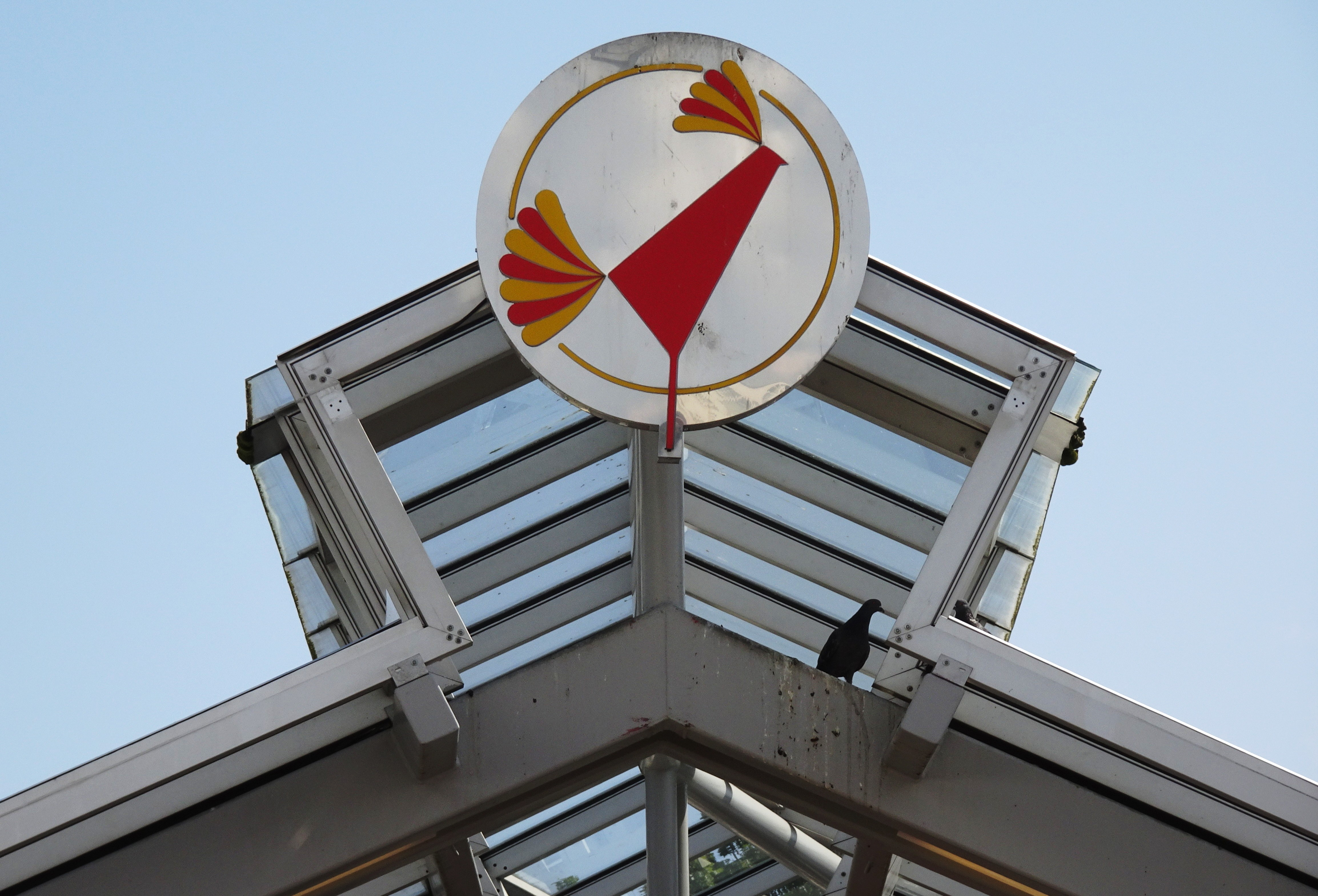 Glastak och emblem i Högdalens centrum